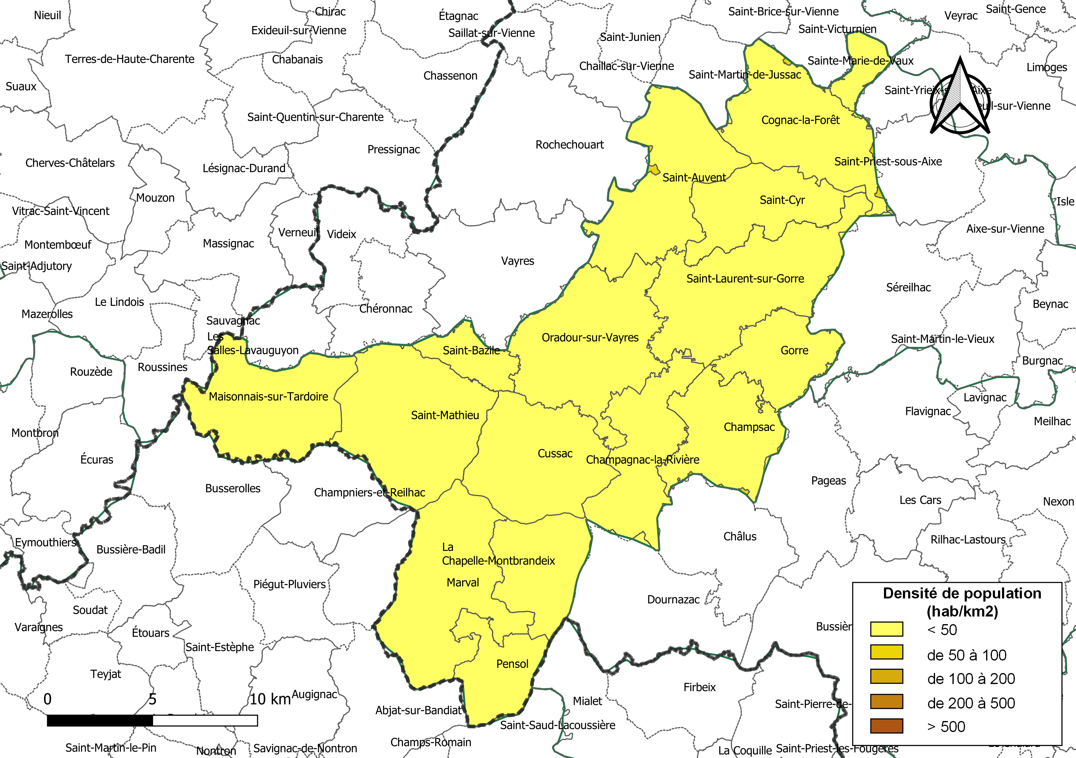 Carte des densités de population (millésimée 2016) des communes de la Communauté de communes Ouest Limousin, département de la Haute-Vienne, France. Composition au 1er janvier 2019.